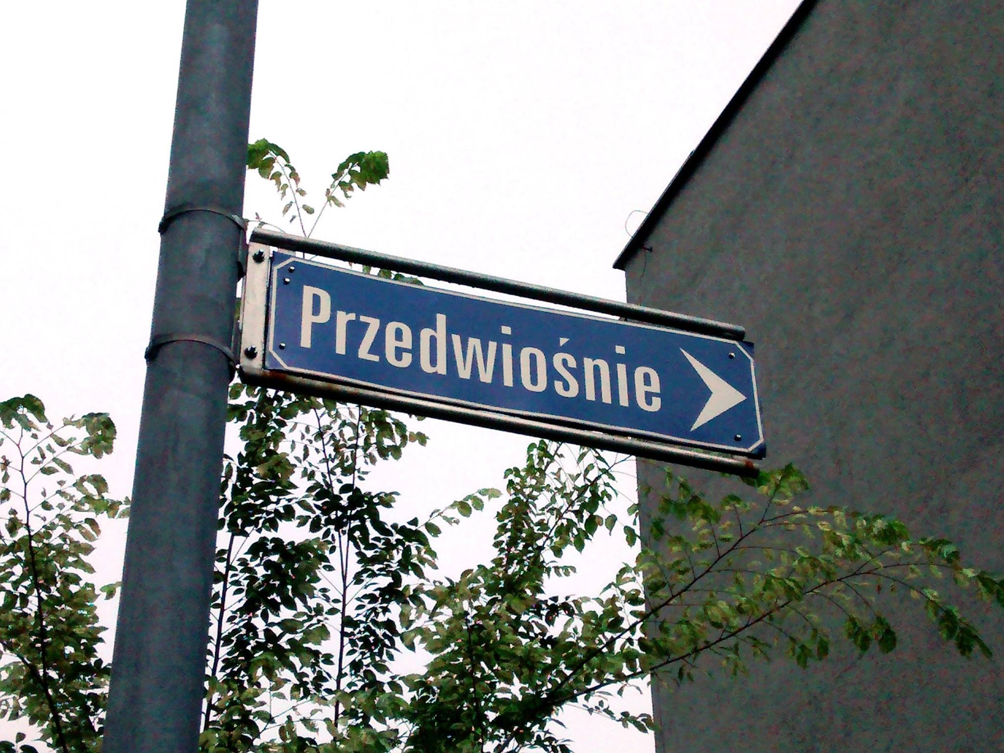 Tablica z nazwą ulicy Przedwiośnie w Katowicach